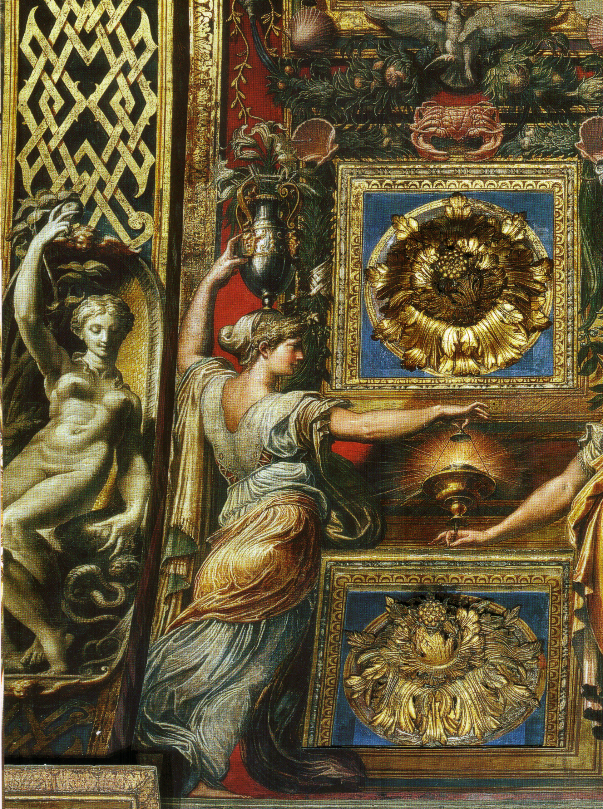 detail